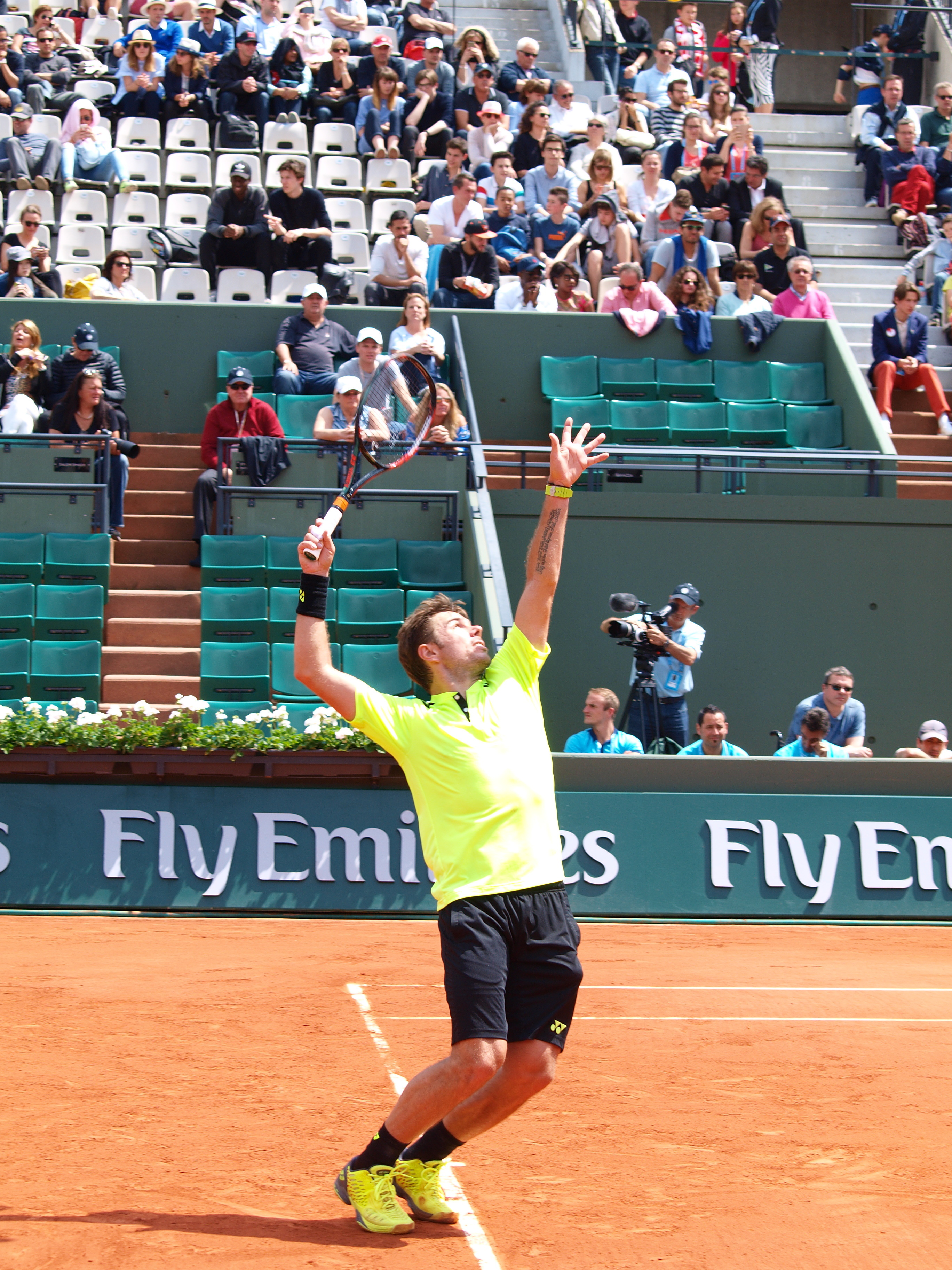 Le joueur de tennis helvète Stanislas Wawrinka, lors des internationaux de France de tennis , sur le stade Roland Garros, à Paris, le 25 mai 2016, dans son duel sportif contre le joueur nippon Taro Daniel.